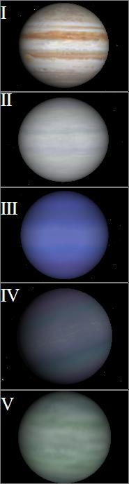 Captura de pantalla de Celestia que muestra los tipos de exoplanetas gaseosos gigantes según la clasificacion de Sudarsky